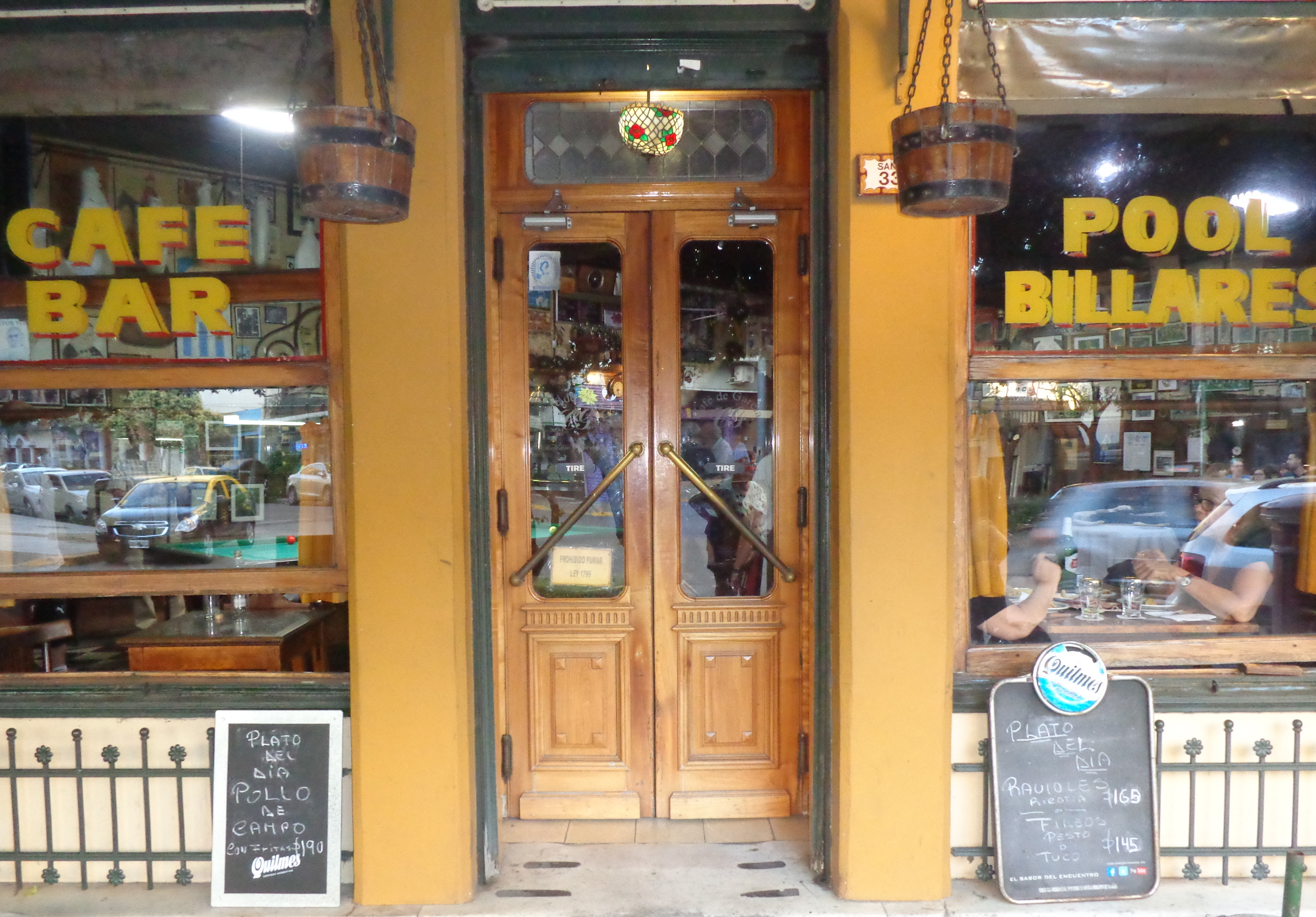 Salón principal, en el Café de García, Calle Sanabria 3302 (esquina con José P. Varela), Villa Devoto, Buenos Aires, Argentina.